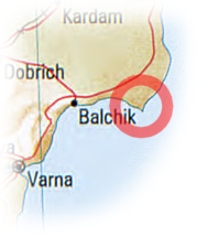 Kaliakra, Bulgaria.